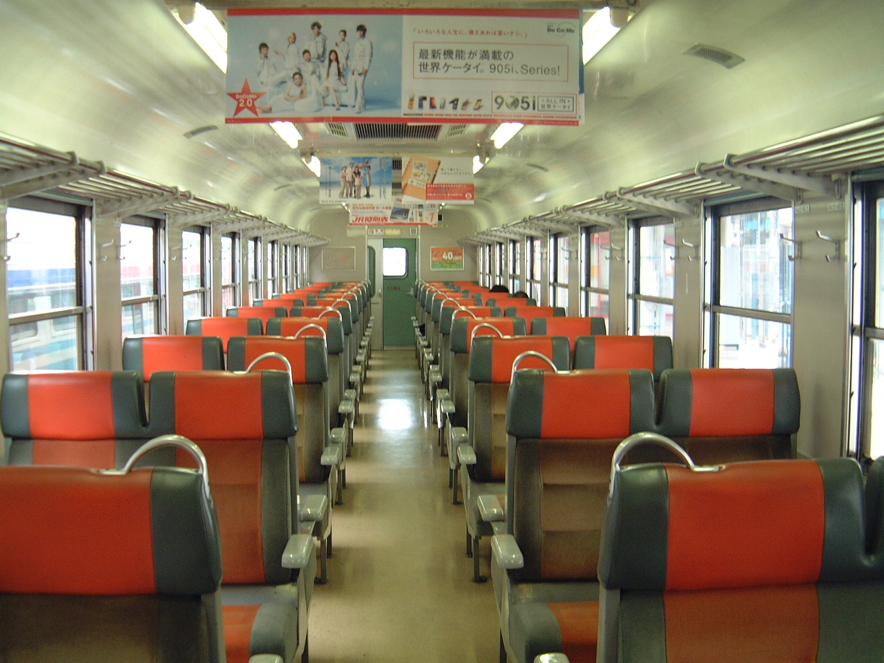 JR四国キハ65車内